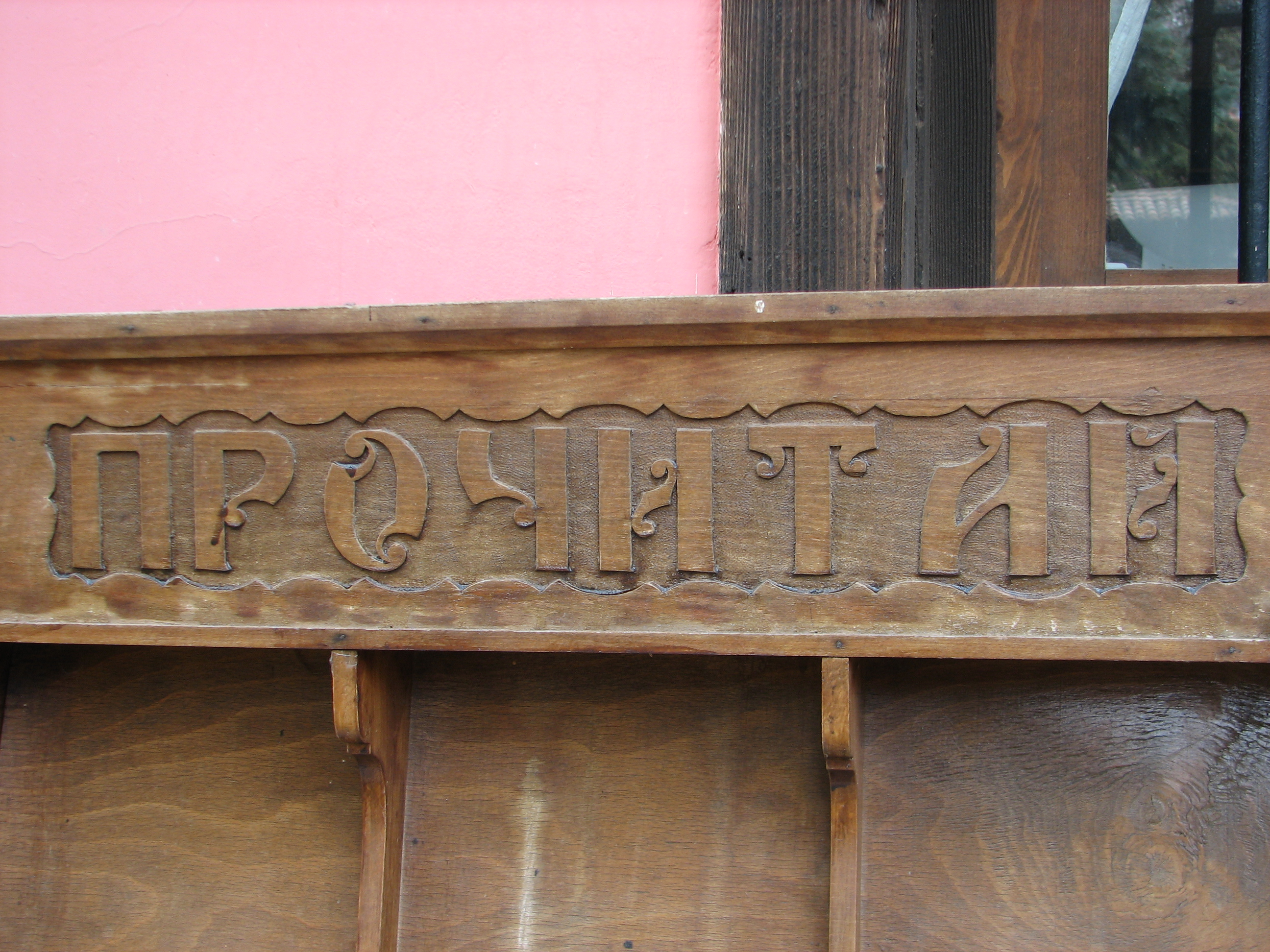 Читалище - девиз.Дърво.